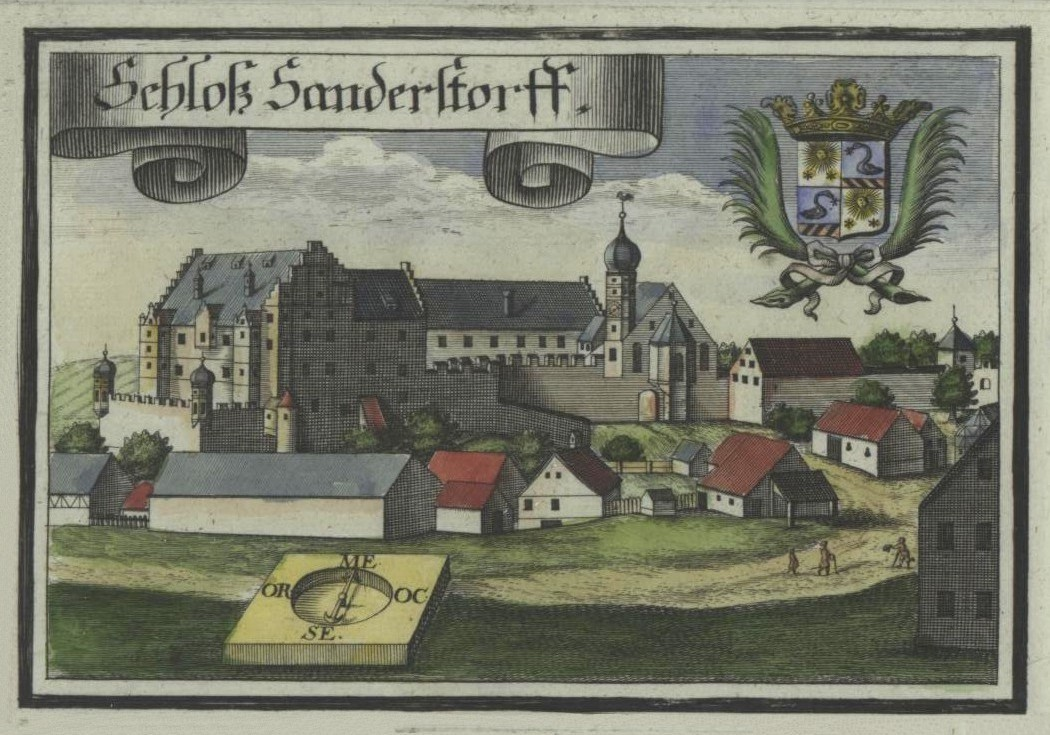 Historische Ansicht von Sandersdorf nach Michael Wening (Kupferstich)